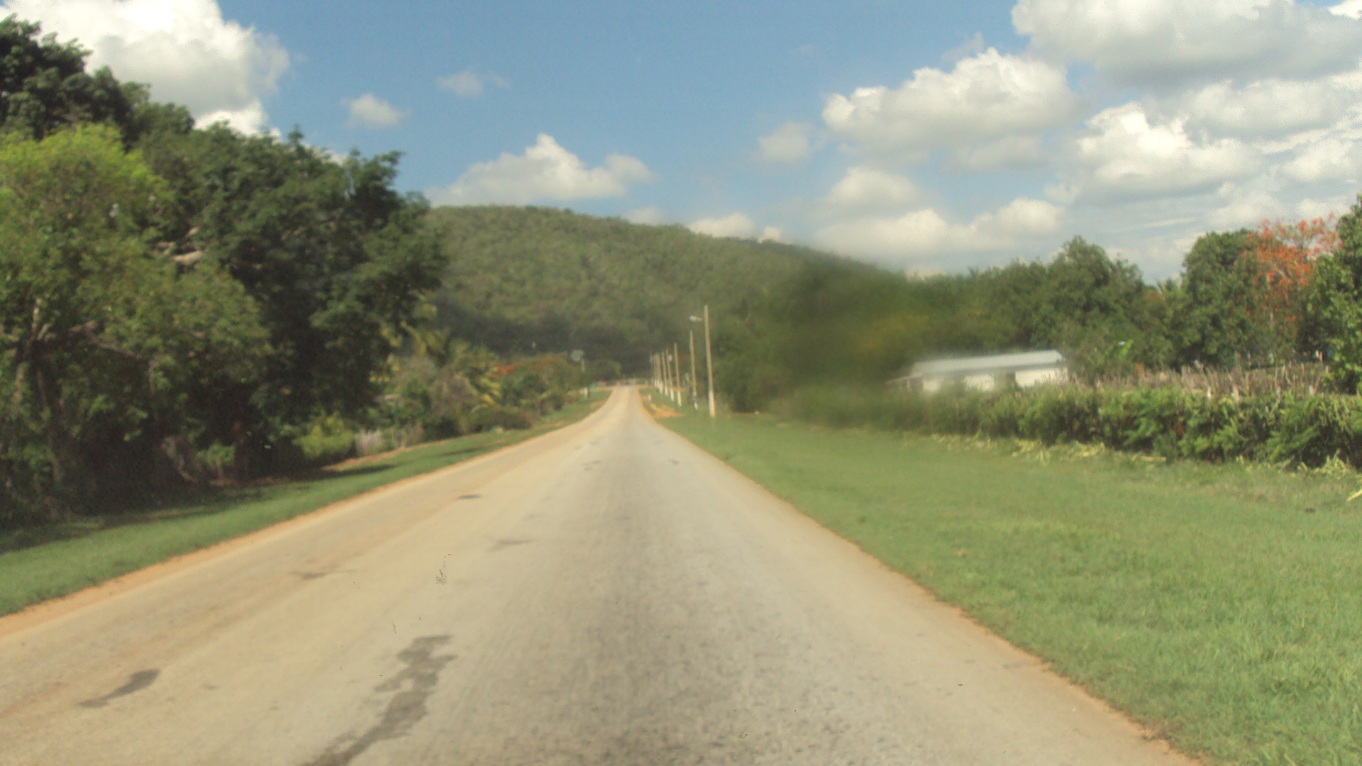 circuito norte de moron a esmeralda